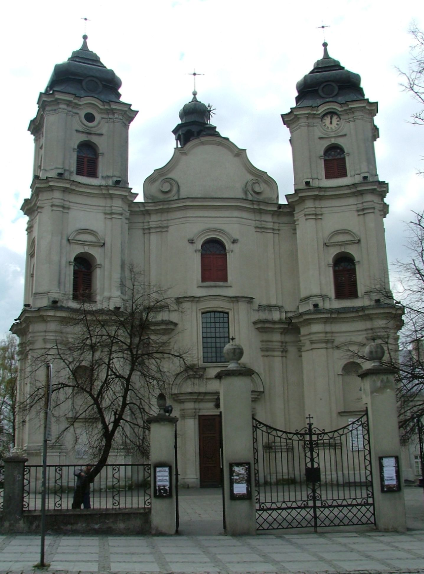 Chełm, Kościół Parafialny pw. Rozesłania Świętych Apostołów, wchodzący w skład kompleksu budowli popijarskich